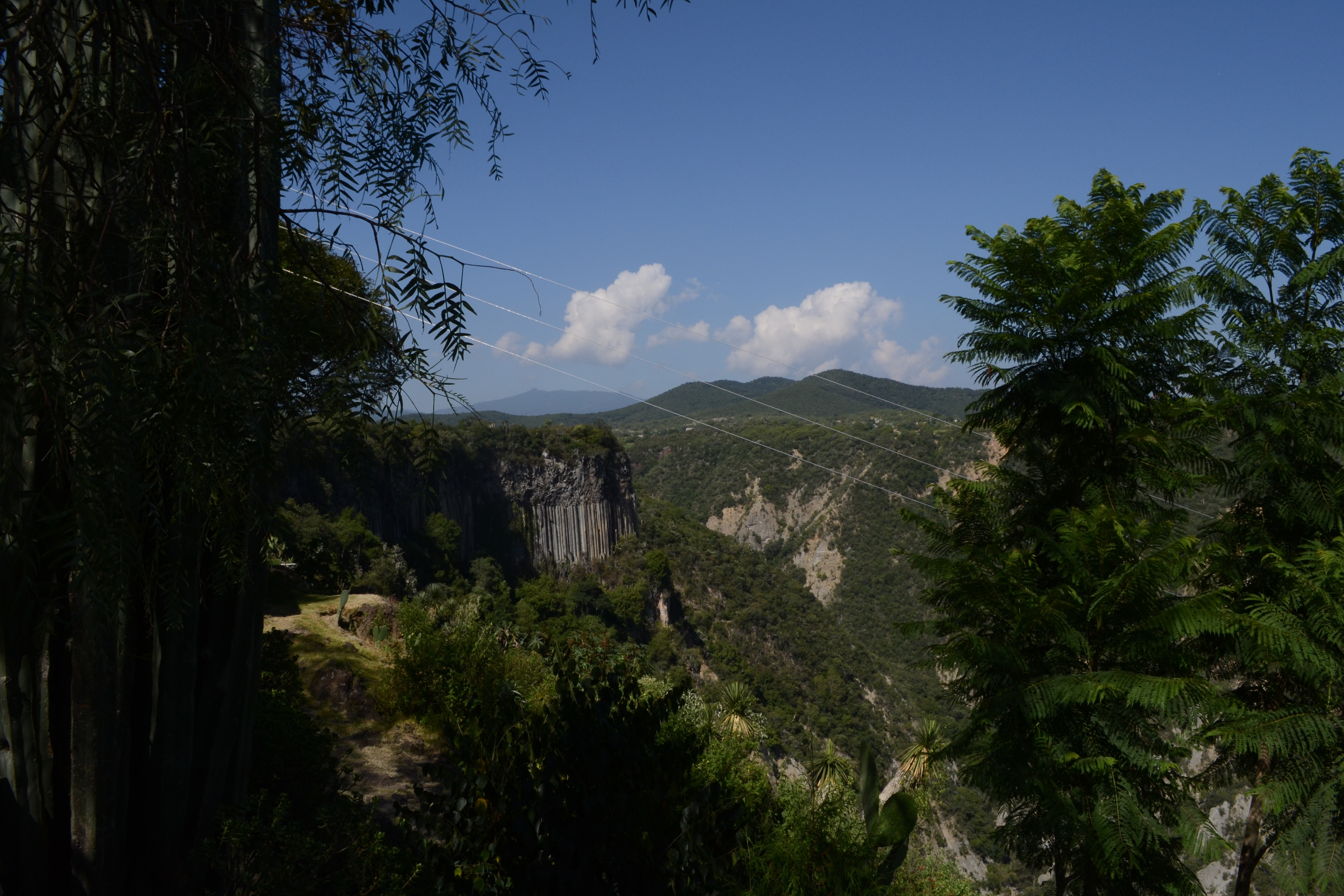 Fotografía de la vista desde la Barranca de Aguacatitla